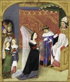 Répudiation d'Aliénor d'Aquitaine